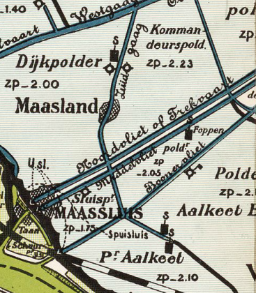 Foppenpolder